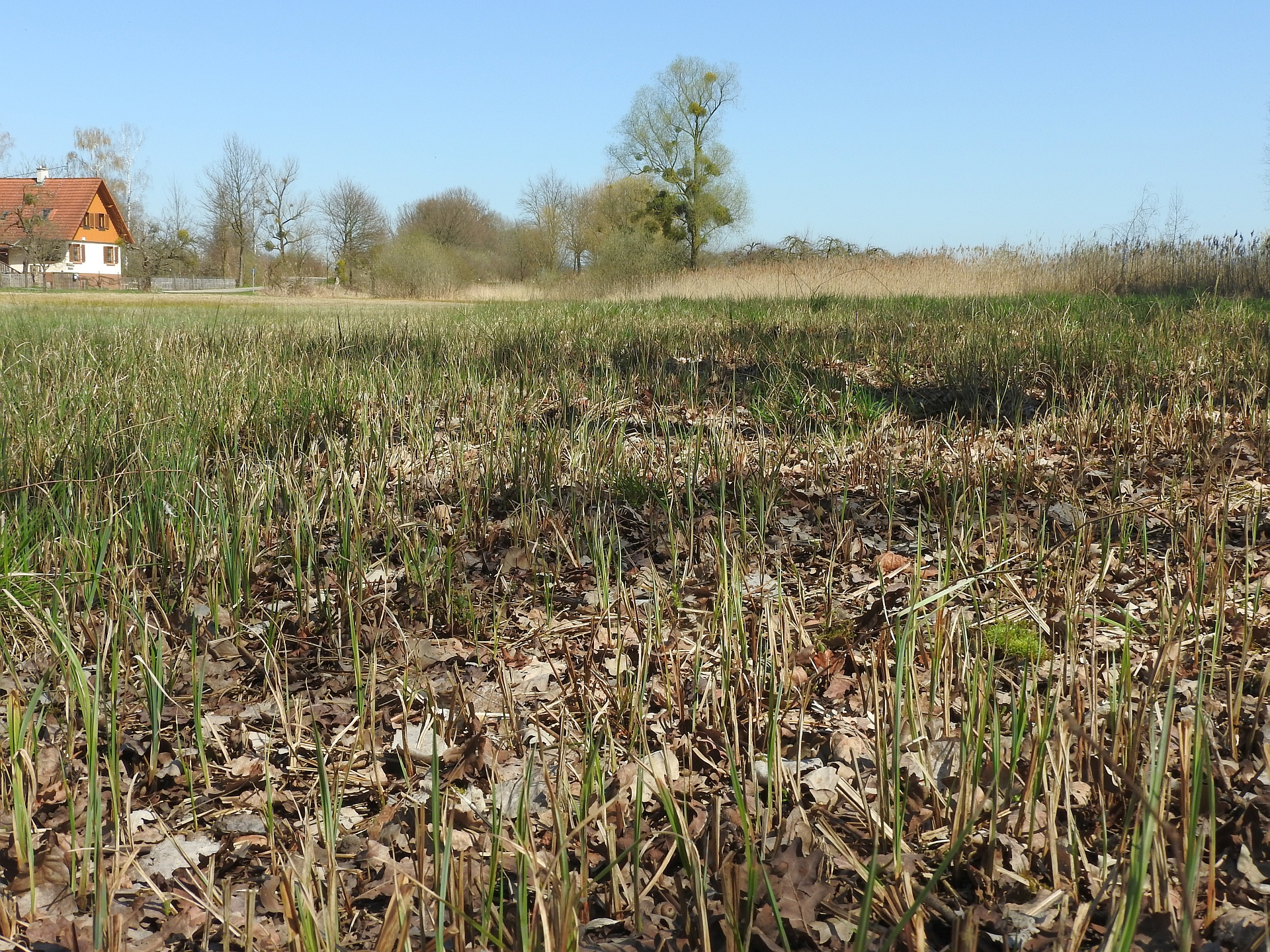 Naturschutzgebiet Sauscholle, 06.04.2018